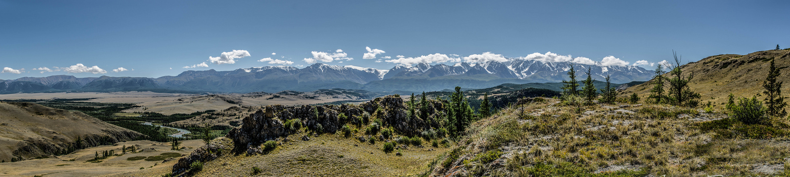 Северо-Чуйский хребет